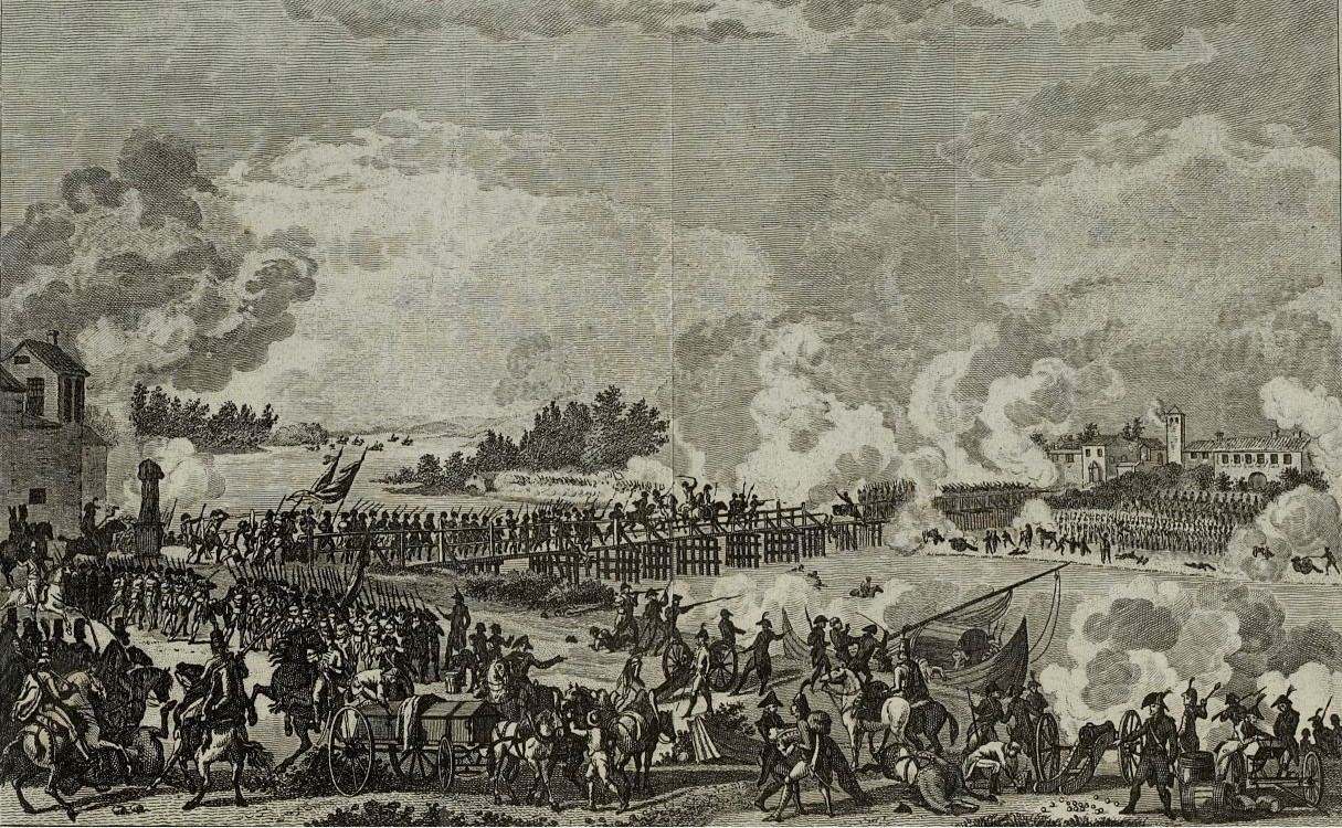 Bataille du pont de Lodi le 11 mai 1796.